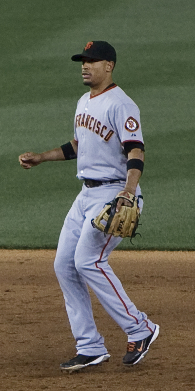 Emmanuel Burriss